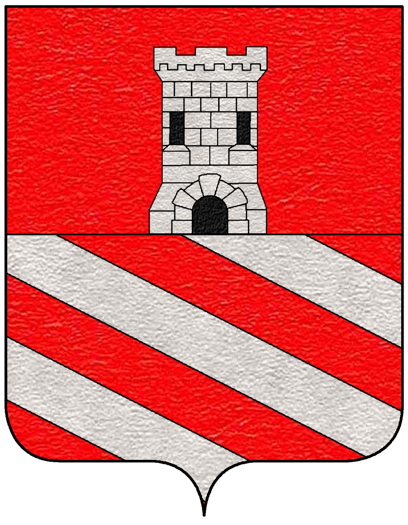 Stemma della famiglia Menze